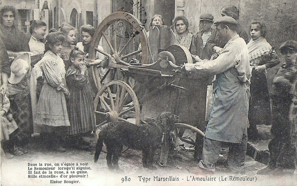 Marseille l'amoulaire remouleur